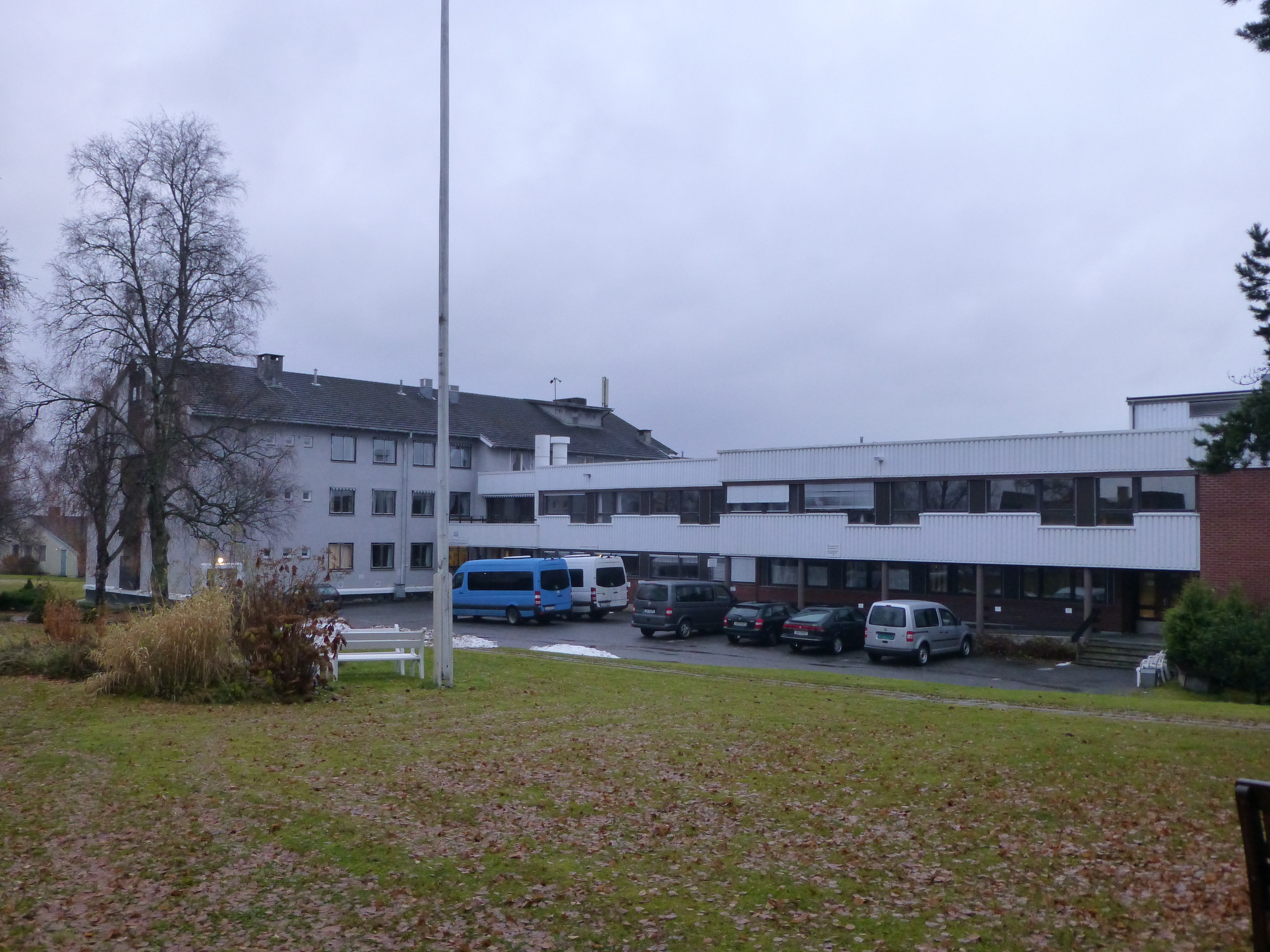 Norderhovhjemmet (Norderhov gamlehjem), i Heradsbygda i Ringerike kommune.